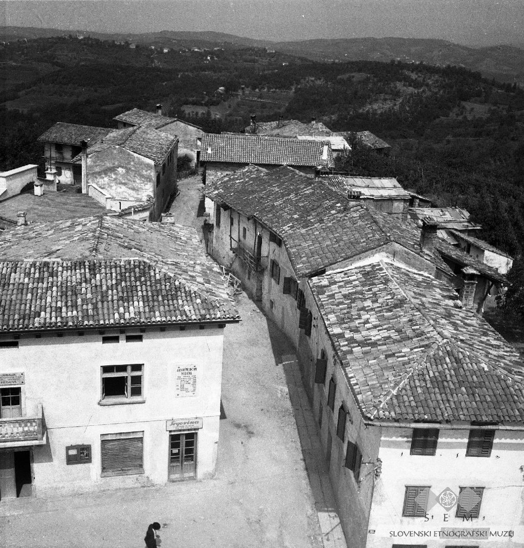 Medana, skupina hiš.